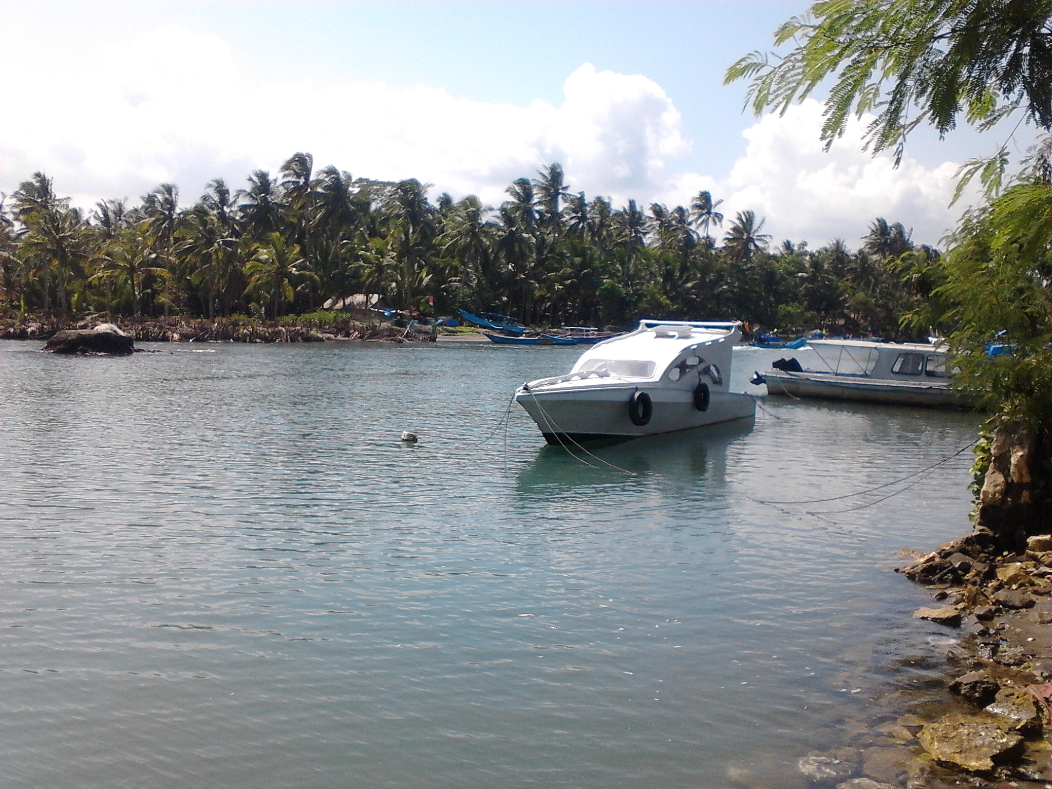 Sungai Cikidang Babakan